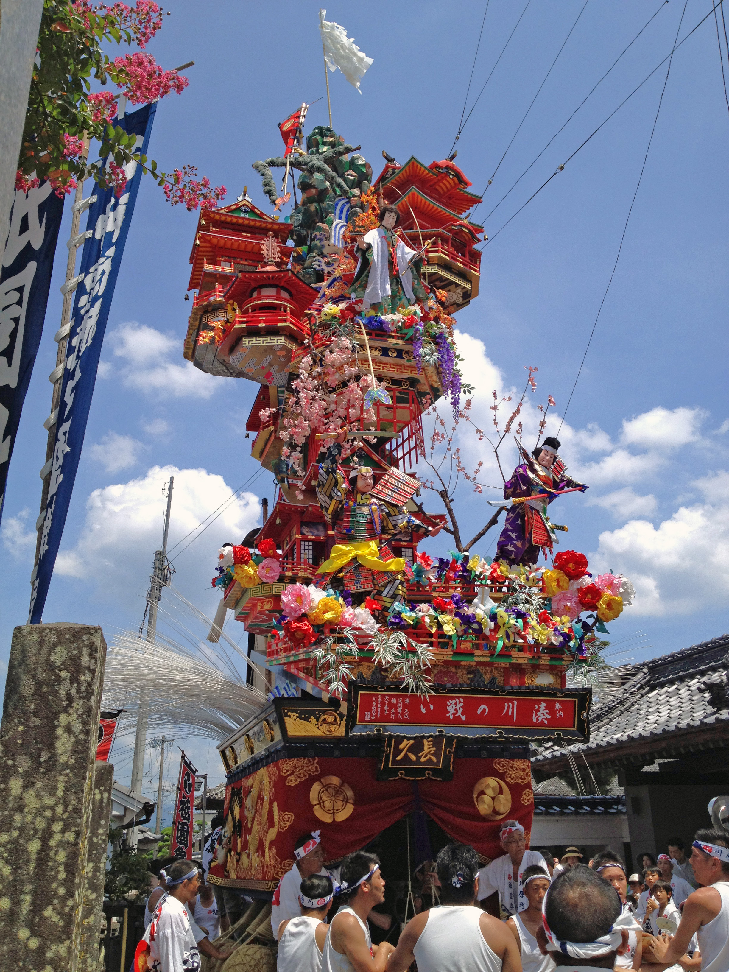 2016年の日田祇園山鉾巡行行事の様子。山鉾は川原町（隈・竹田地区）のもの。隈町にある八坂神社参詣の様子。